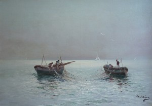 Huile sur toile signée en bas à droite - 43 x 61 cm